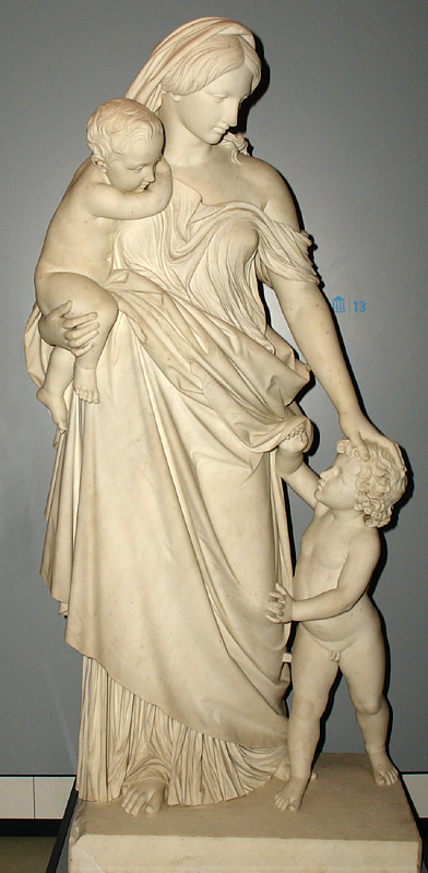 Focke-Museum Bremen: Denkmal der Louise Wätjen, "Caritas". Marmorgruppe von Carl Steinhäuser. Bezeichnet: "C.Steinhäuser fec. Roma" 1866. Dargestellte Personen: Louise Wätjen, geb. Delius (*4.9.1818; †16.4.1859) mit den beiden jüngsten ihrer neun Kinder. Ursprünglich gedacht für Louises Grab auf dem Heerdentorsfriedhof, zum Schutz vor Witterungseinflüssen dann aber in der Eingangshalle des Sommersitzes der Wätjens in Blumenthal aufgestellt. Qu:Focke Museum